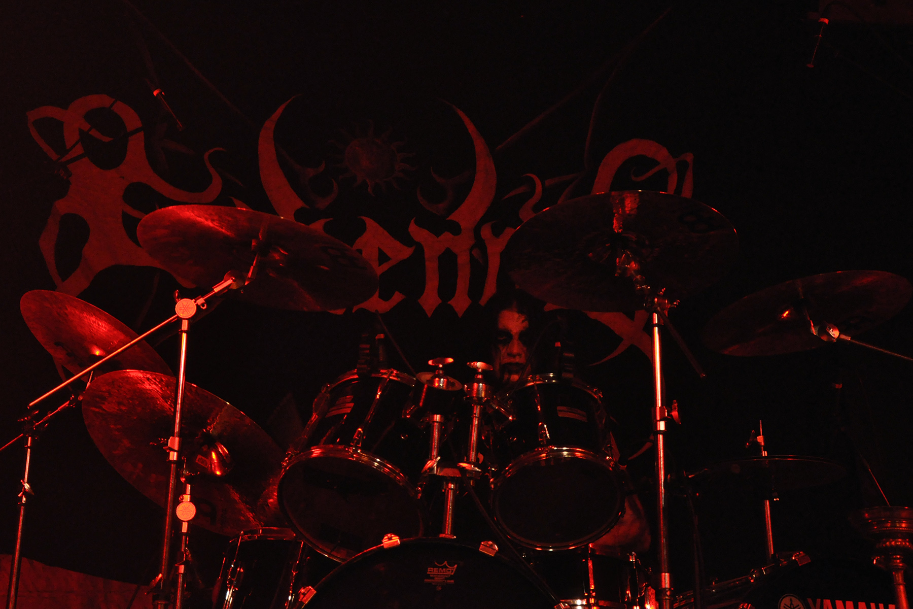 Gehenna au festival "Nacht der Drohenden Schatten" à la Halle 101 à Speyer (Ger), le 19 Février 2011.